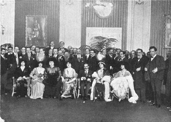 Fotografía del escritor argentino Enrique García Velloso rodeado de artistas y peridistas a los que invitó a una fiesta en el Hotel Palace de Madrid en 1913